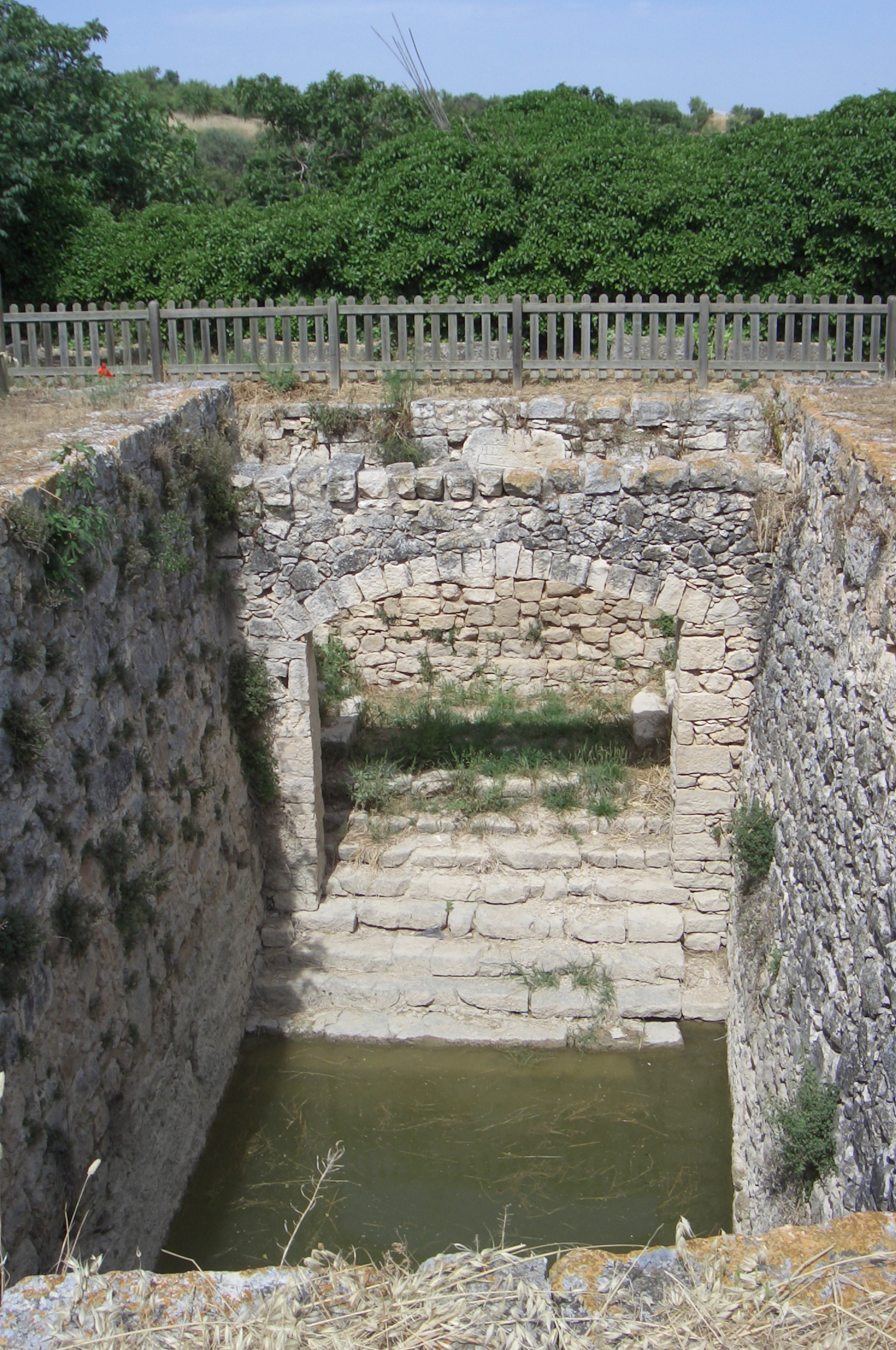 Pou de la Vila d'Almatret